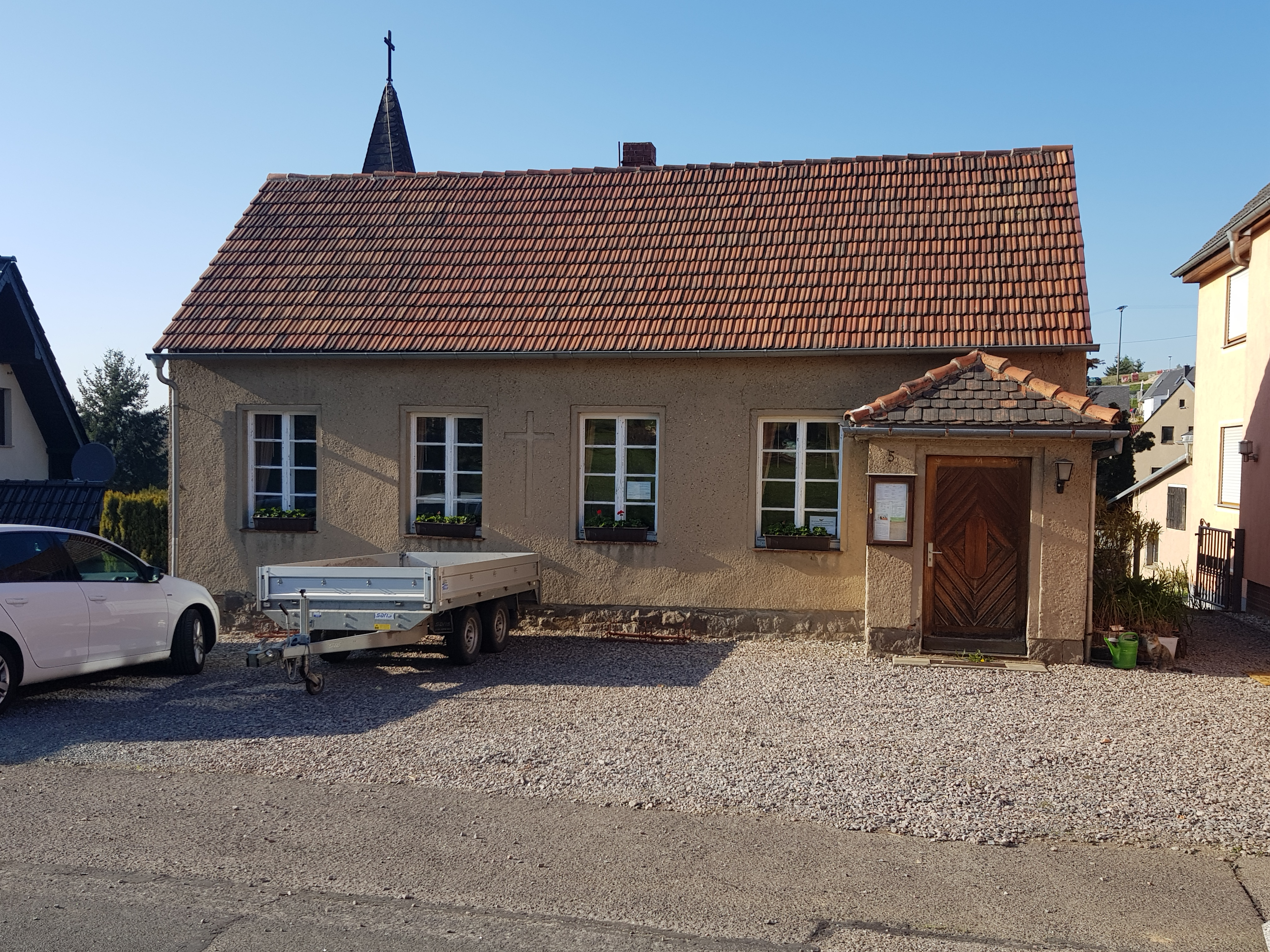 Kirche von Stein im Chemnitztal